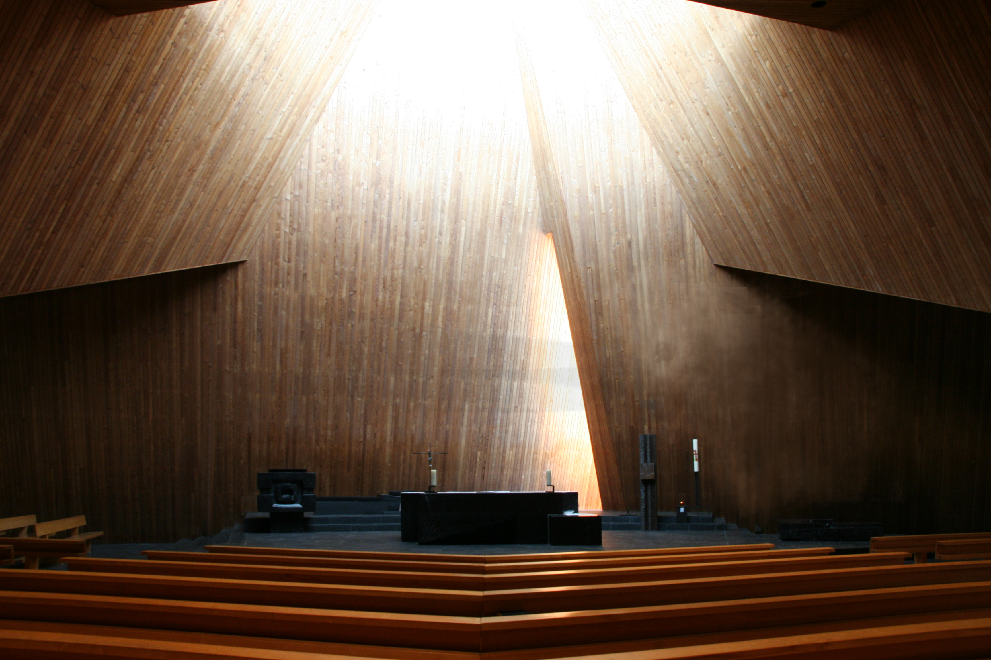 Römisch-katholische Pfarrkirche Maria Krönung Zürich-Witikon, Architektur von Justus Dahinden, Altarraum von Georg Malin